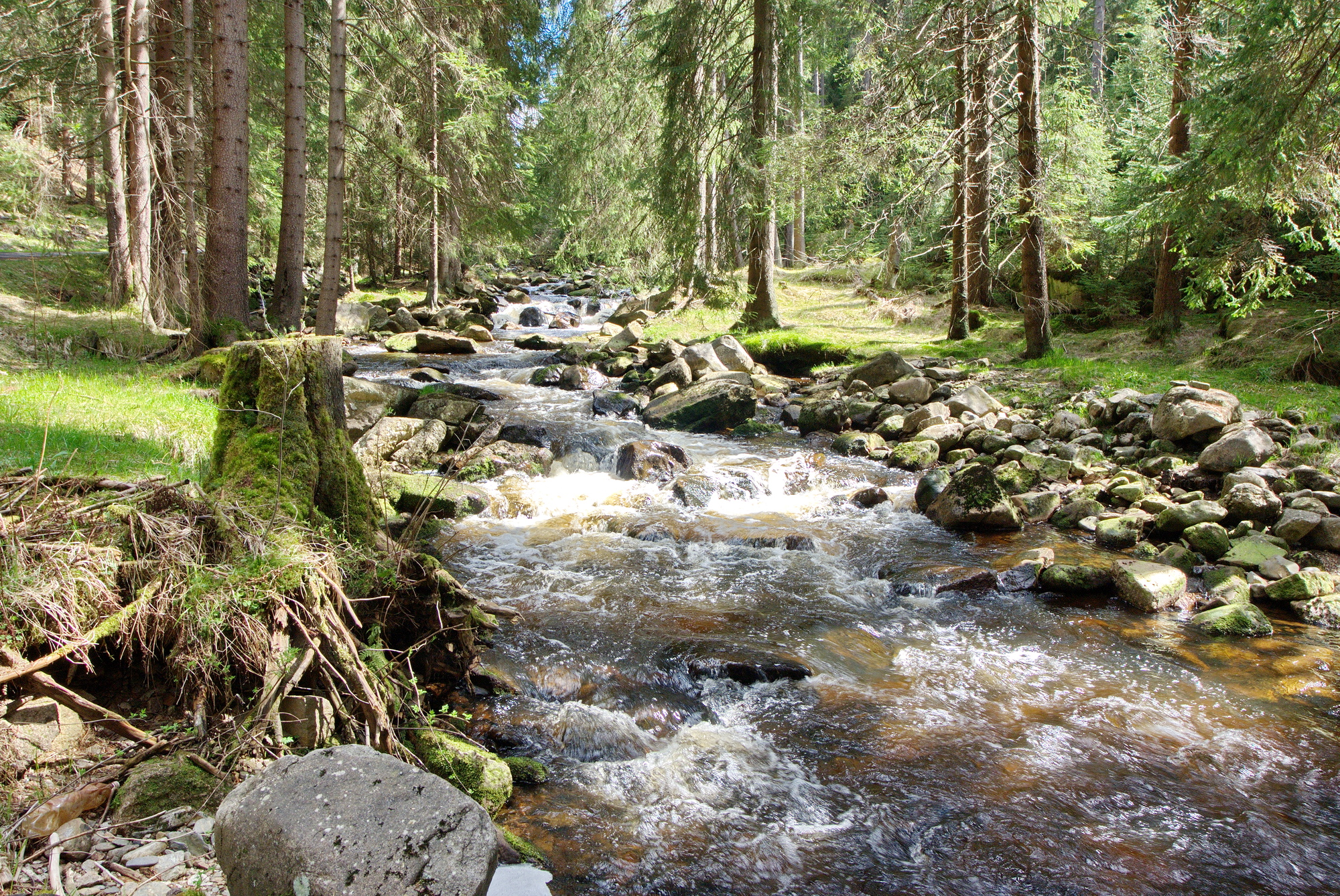 Říčka Černá v místě zaniklé osady Luhy, Krušné hory, okres Karlovy Vary